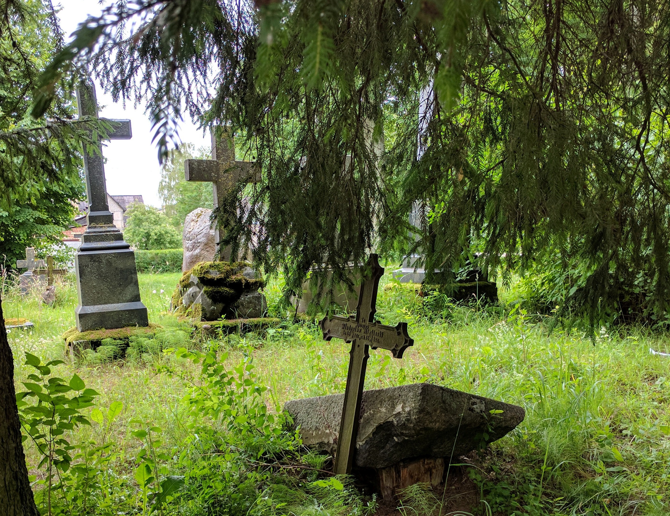 Widok starego cmentarza, na pierwszym planie krzyż na grobie Władysława Miglińskiego i przewrócona płyta Brygidy Szczotkowskiej